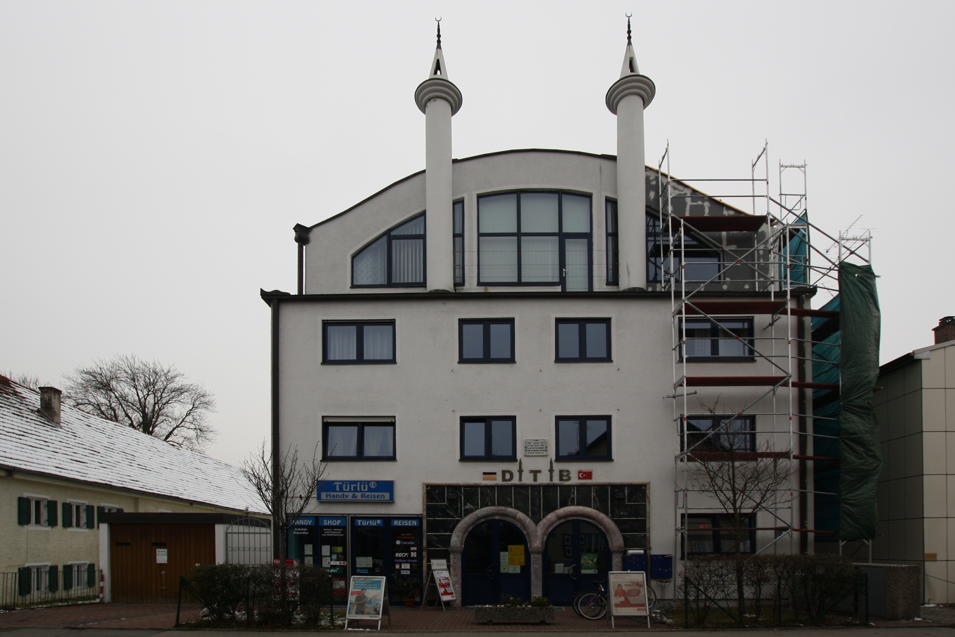 DİTİB-Moschee München-Pasing